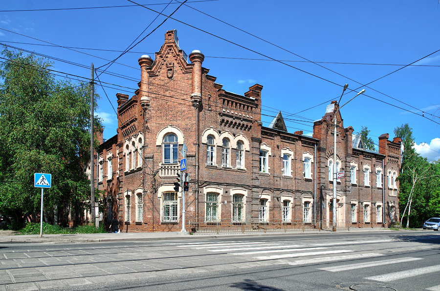 Здание мужской частной гимназии (Томская область, Томск, р. люксембург улица, 64)